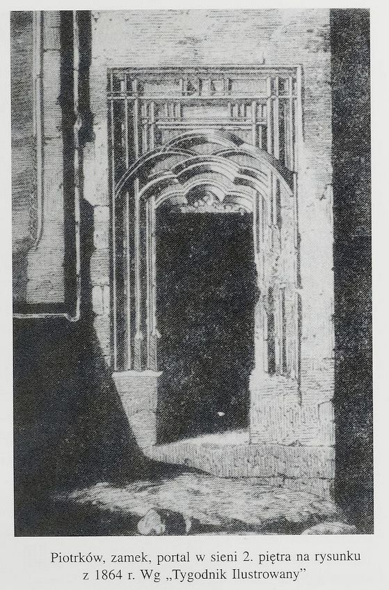 Portal z XVI wieku w sieni wieży królewskiej w Piotrkowie Trybunalskim. Rysunek opublikowany w Tygodniku Ilustrowanym w 1864 r.